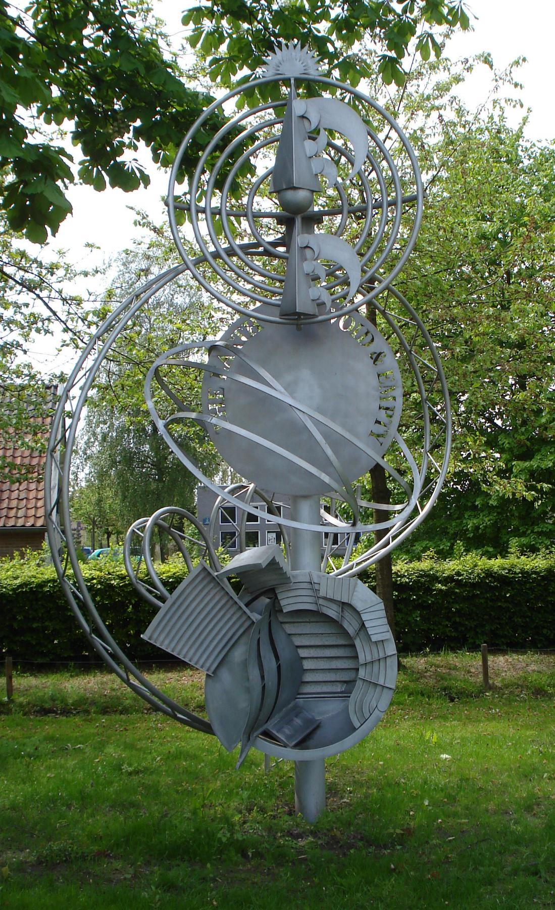 Amersfoort, Laan der Hoven. Kunstwerk "Fantasy Sculpture II" by Alice Aycock. Amersfoort/The Netherlands.